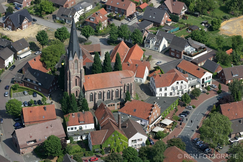 Luftaufnahme der Kirche St. Silvester zu Erle im Westmünsterland